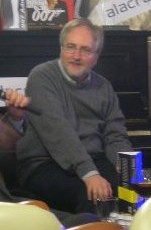 Zdjęcie Raymonda Bensona w hotelu w Mediolanie